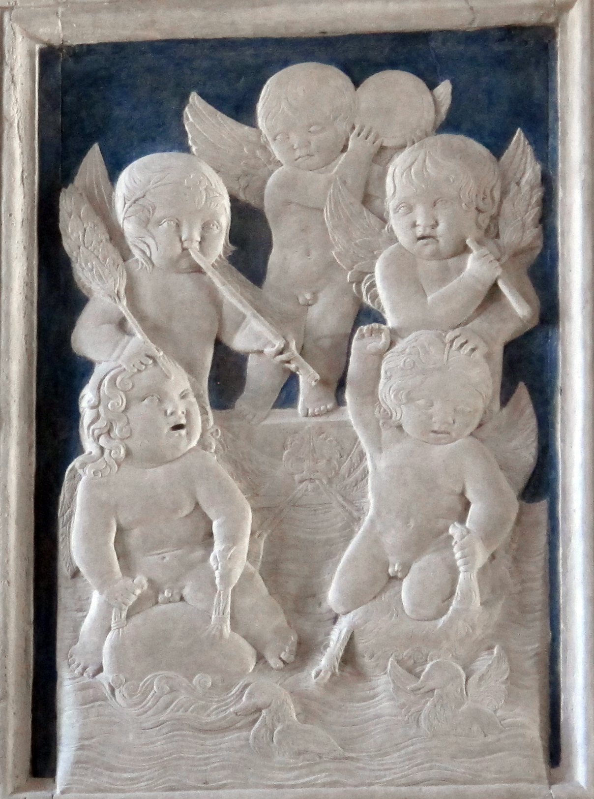 Tempio Malatestiano - MIBAC This is a photo of a monument which is part of cultural heritage of Italy.